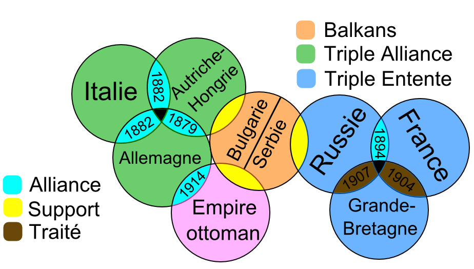 Traduction en français de la situation diplomatique de la Poudrière des Balkans.